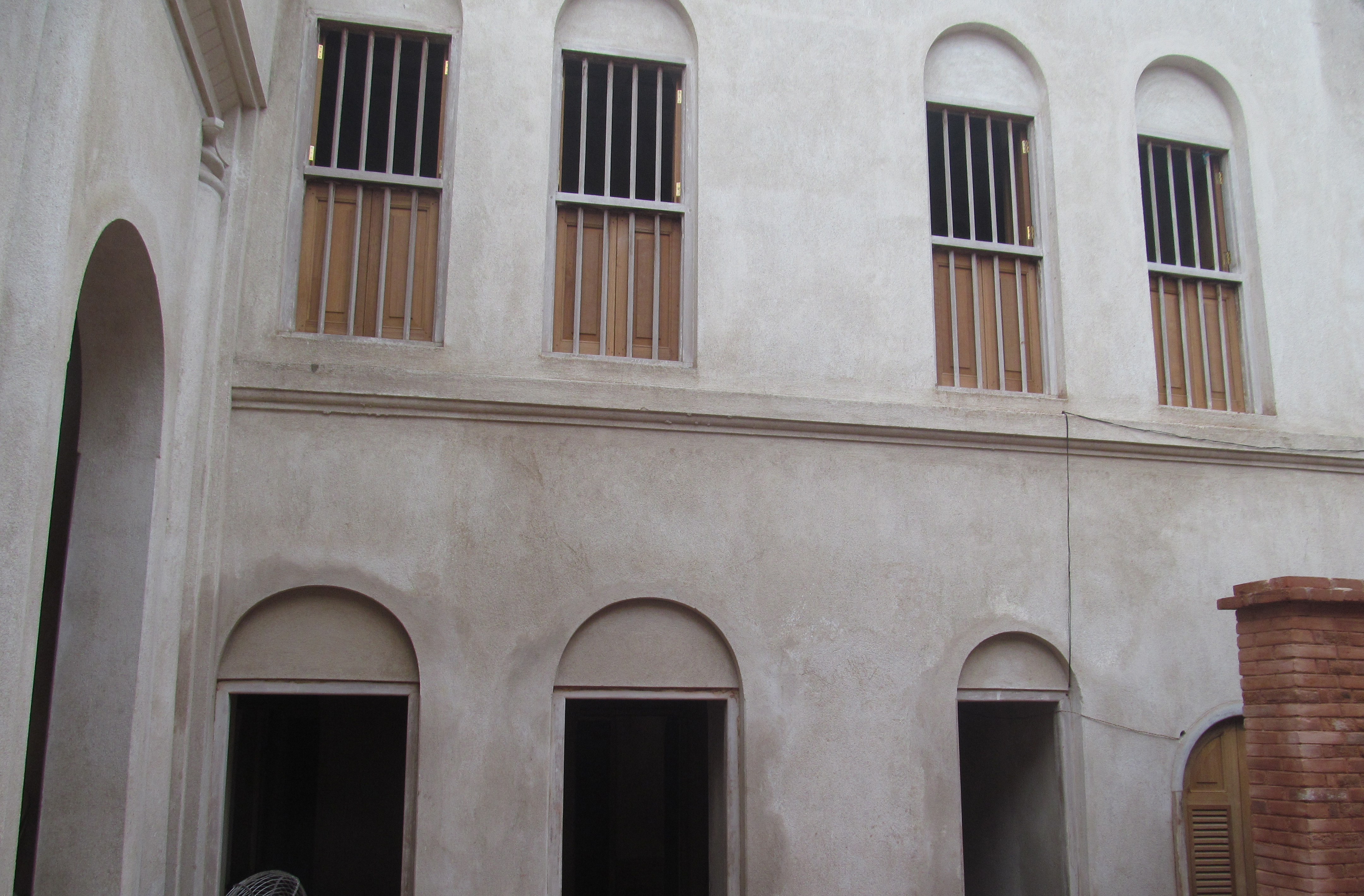 ১৬ এ মা সারদামণি সরণি সংস্কারাধীন অবস্থায়